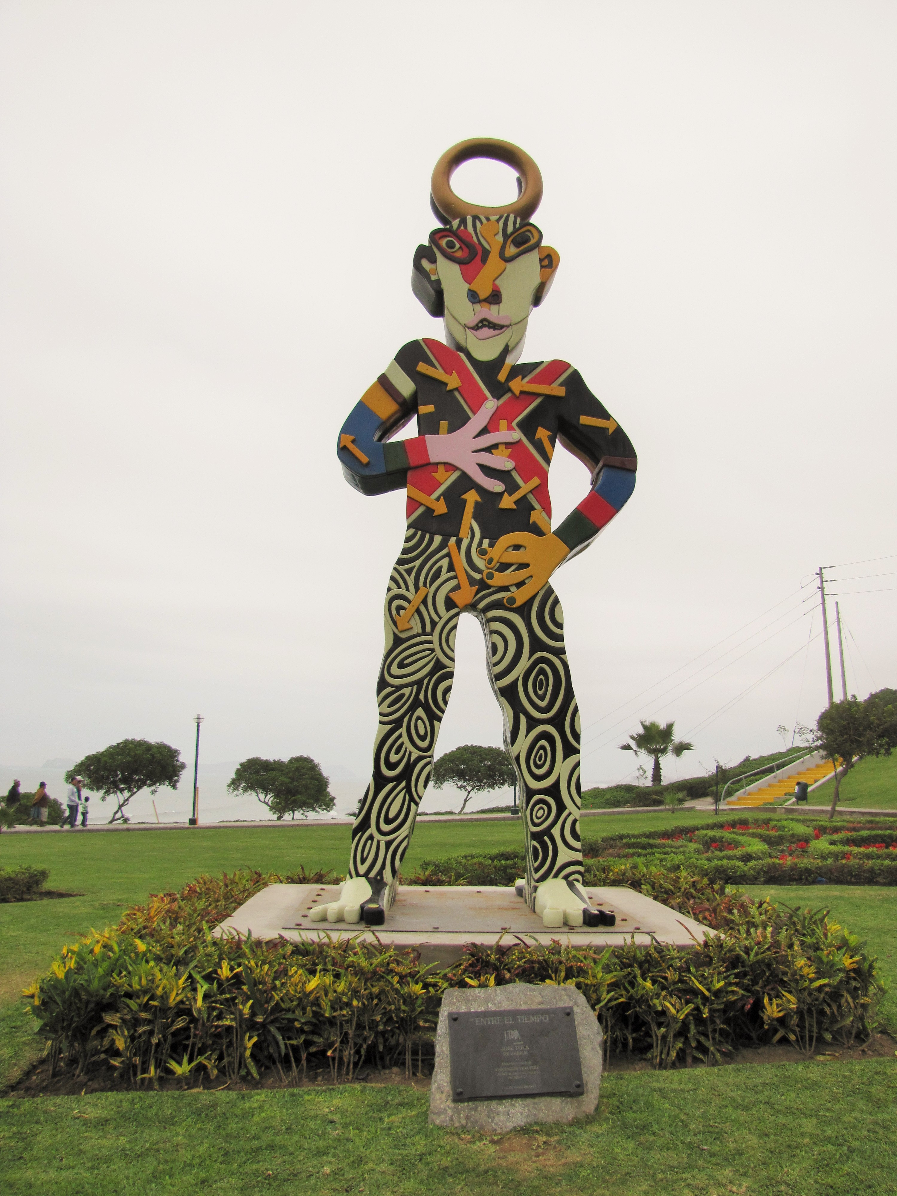 Escultura "Entre el tiempo" de José Tola en el Parque Yitzhak Rabin